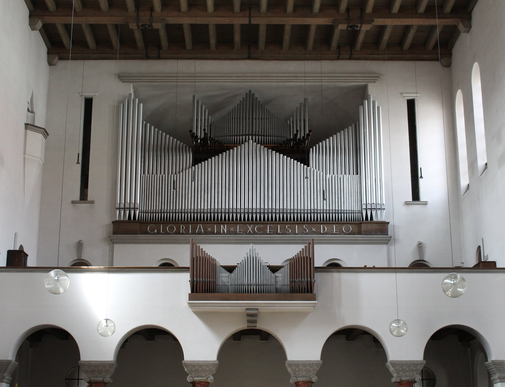 Orgel von St. Gabriel in München (1969, Walcker op. 5262, III/30)